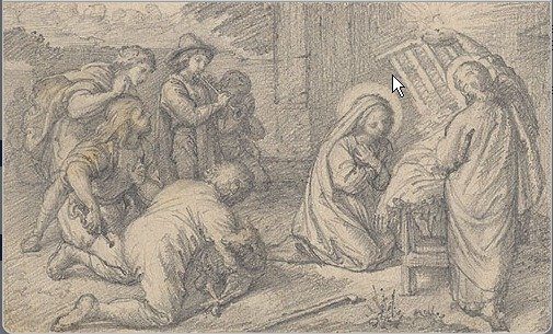 Andreas Mayr (Unterthingau): Anbetung der Hirten Bleistift auf Velin, rechts auf freigebliebenem breitem Rand hochkantig bezeichnet und datiert „Jos. zur Composition den 4 Jänner 1876.“. Darstellungsgröße 6,3:10,3 cm, Blattgröße 6,3:16,7 cm.